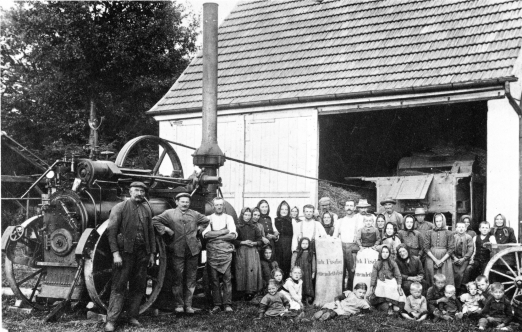 Dreschmaschine vor der Rottler’schen Scheune (Bahnhofstr. 10) in Neuendettelsau